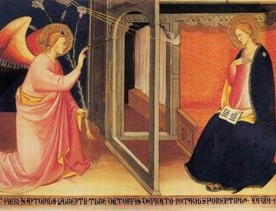 Museo dell'opera del duomo, prato, Annunciazione (1410) attribuita a Lorenzo di Niccolò